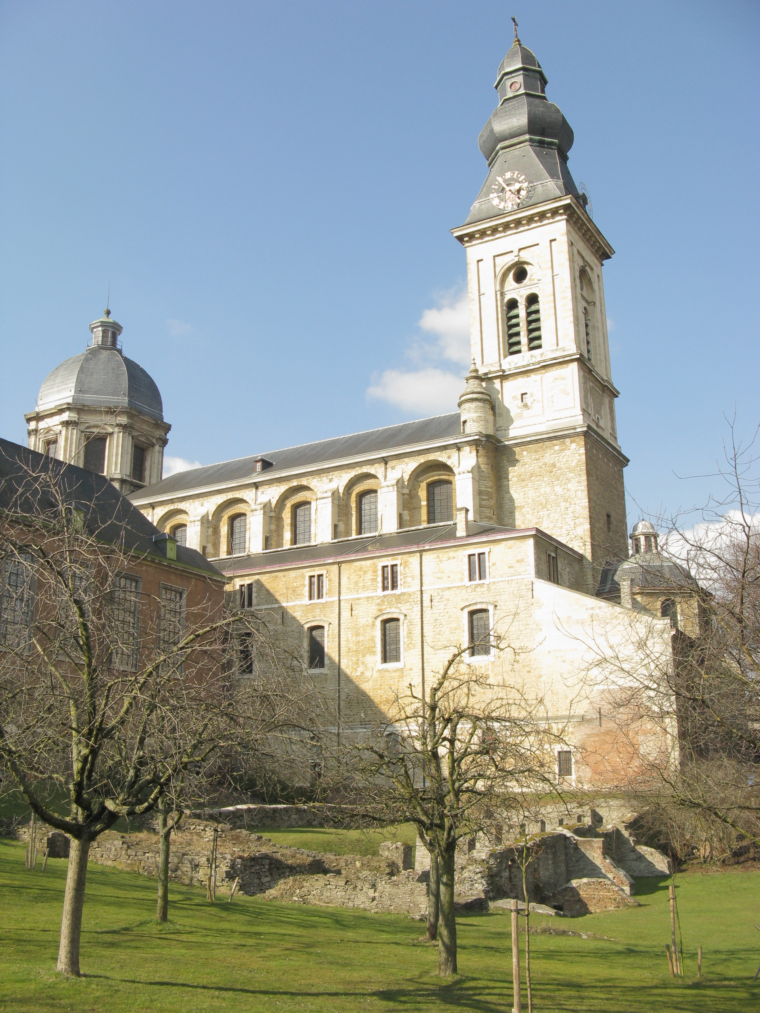 Tuin van de Sint-Pietersabdij in Gent, België.